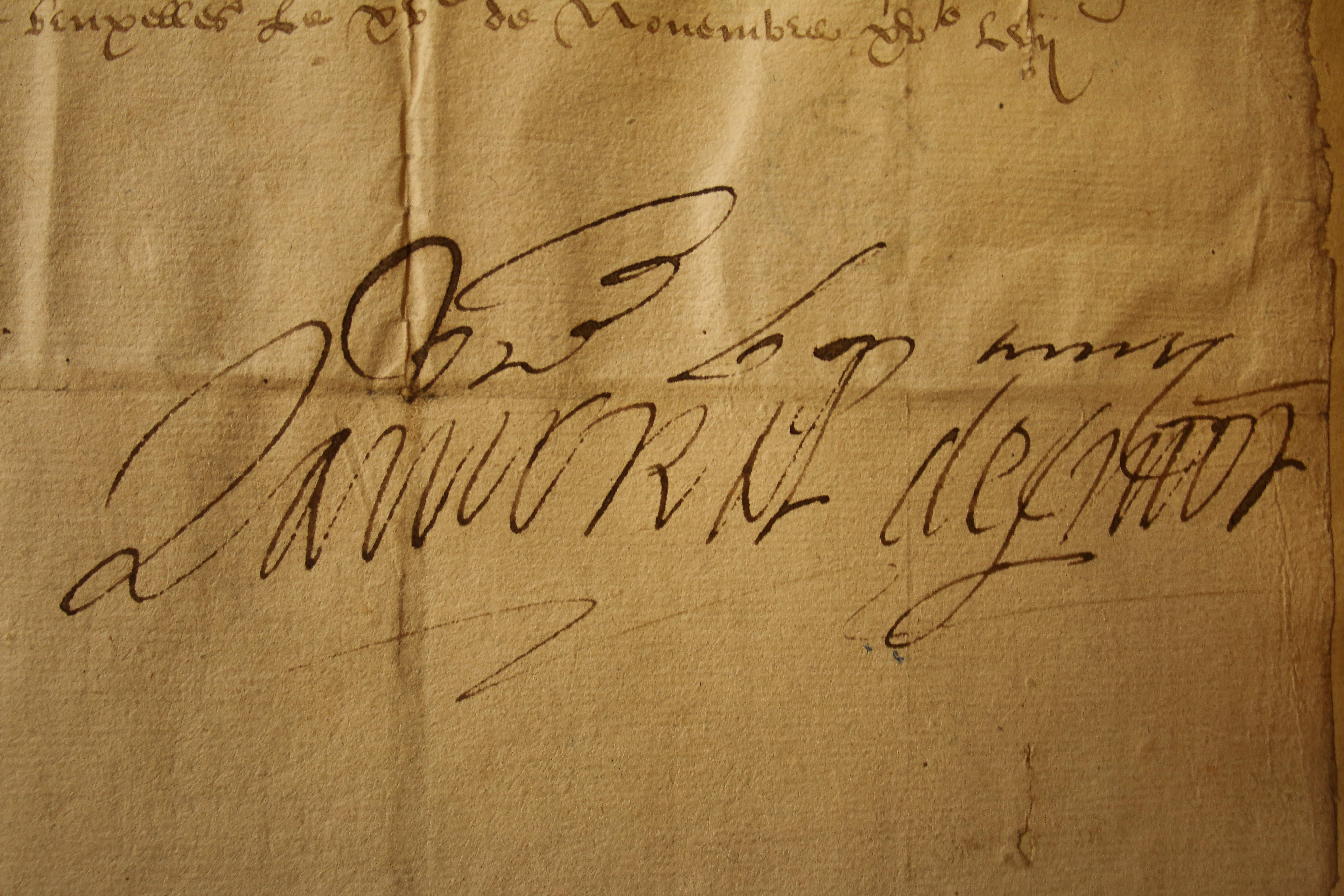 handtekening Lamoraal van Egmont, brief aan de heer van Ohain, 1557 (universiteitsbibliotheek Gent)